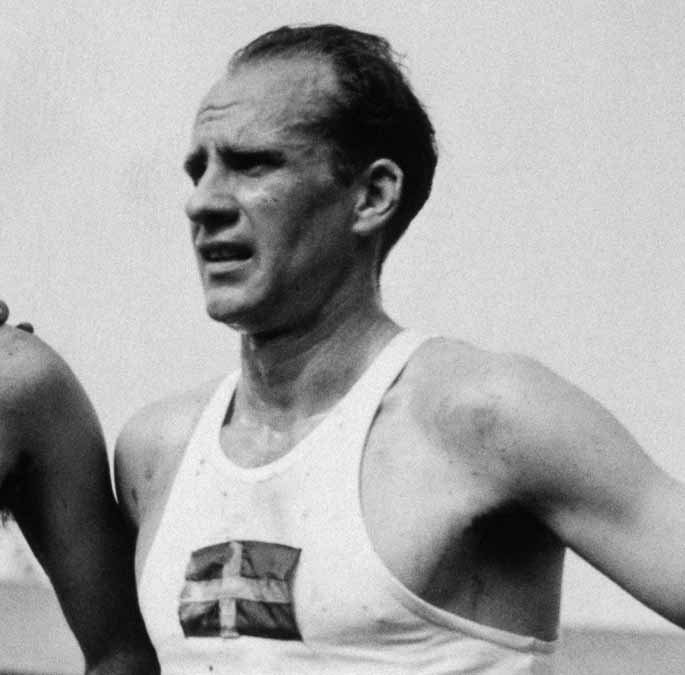 Göte Hagström, London Olympics